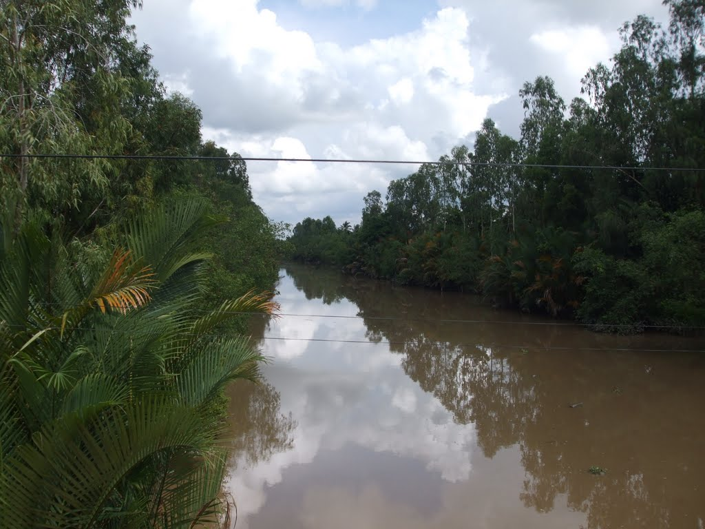 Con Sông quê hương tại vùng quê Mang Thít